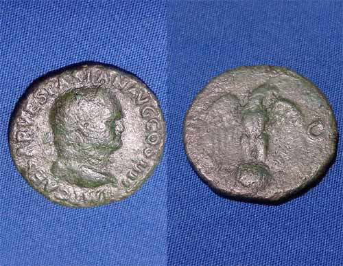 As des Vespasian